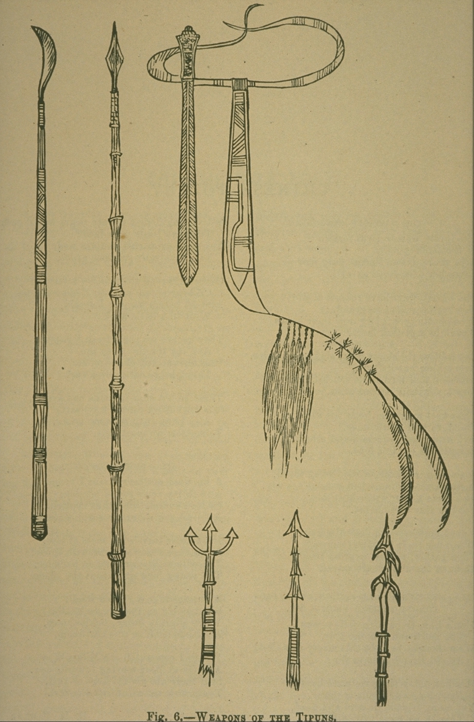 中文（台灣）: Tipun族人的武器。